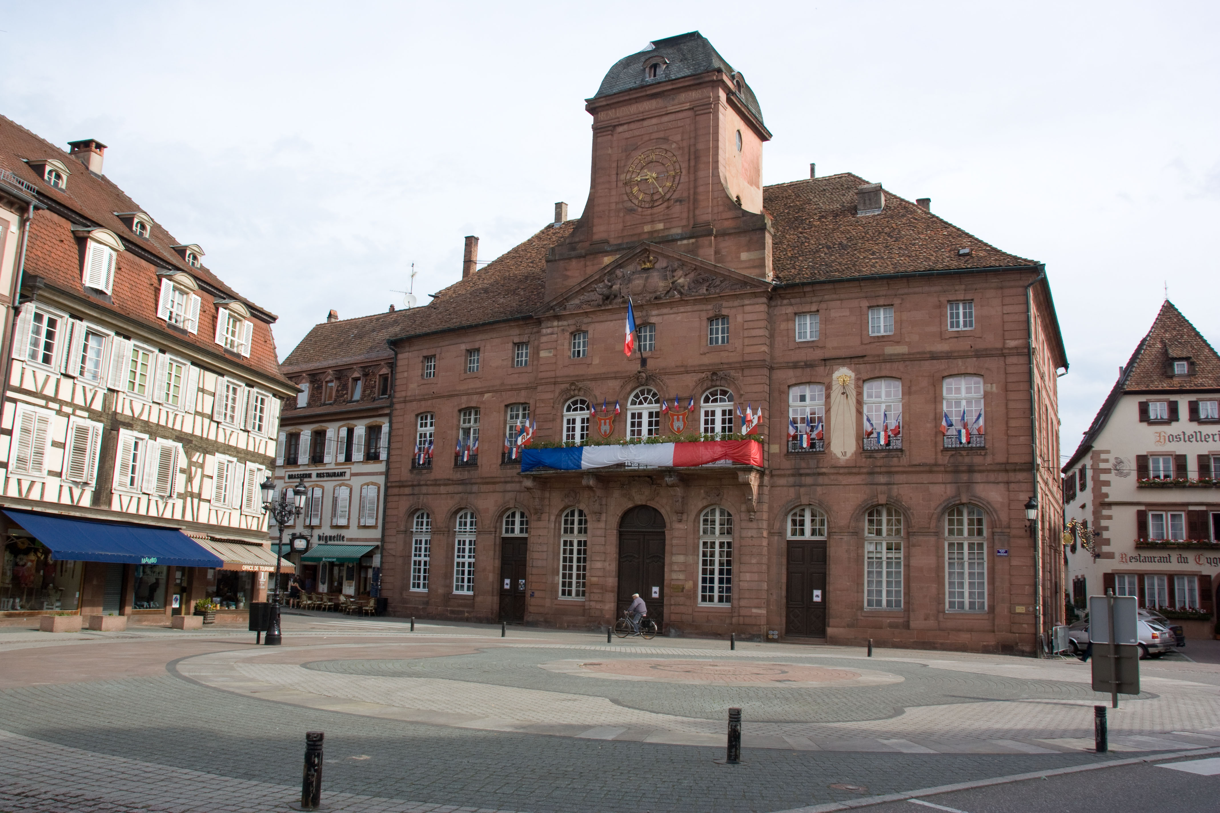 La mairie de Wissembourg, Alsace, France